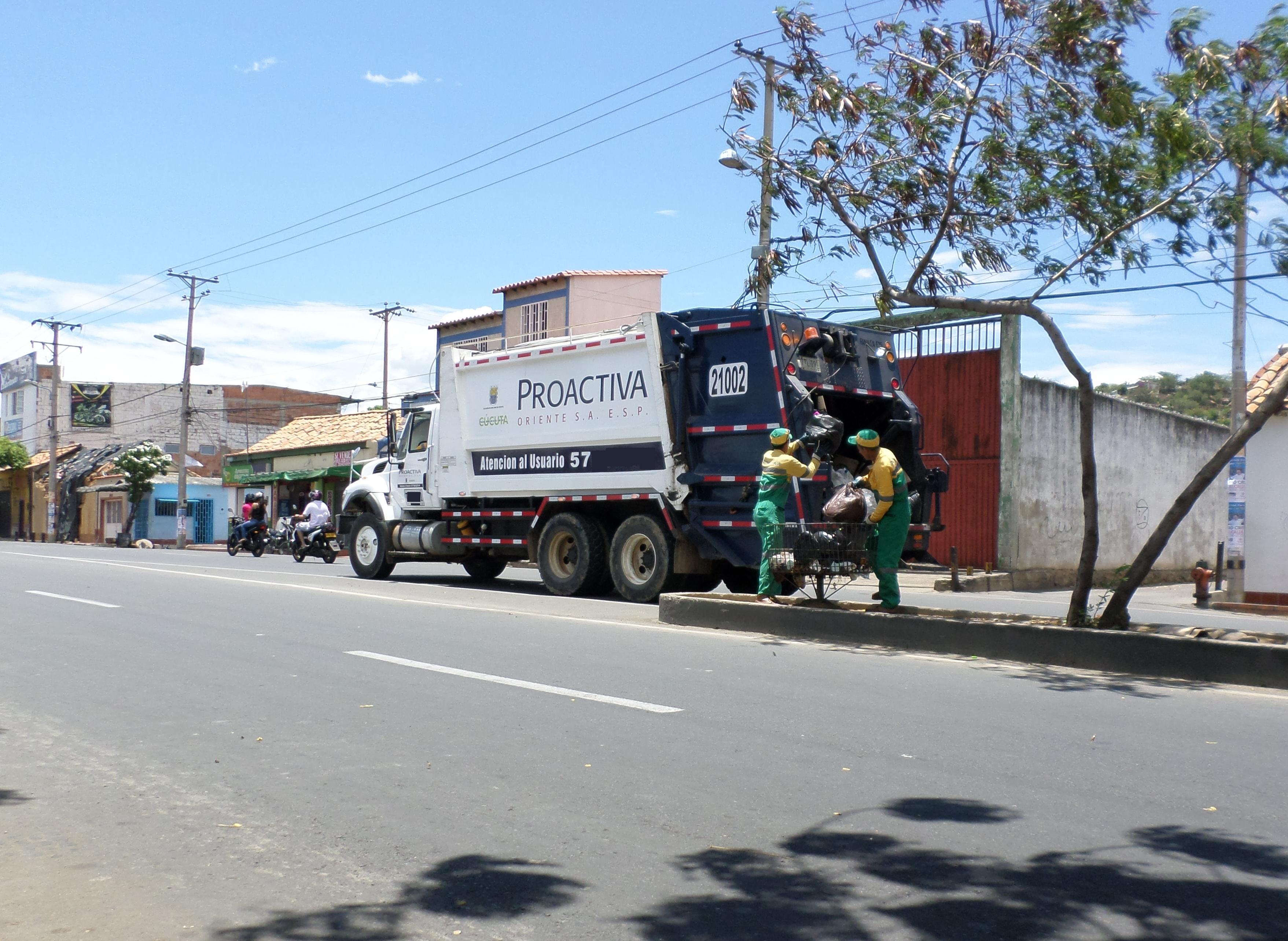 Carro de la basura en Cúcuta NS Col